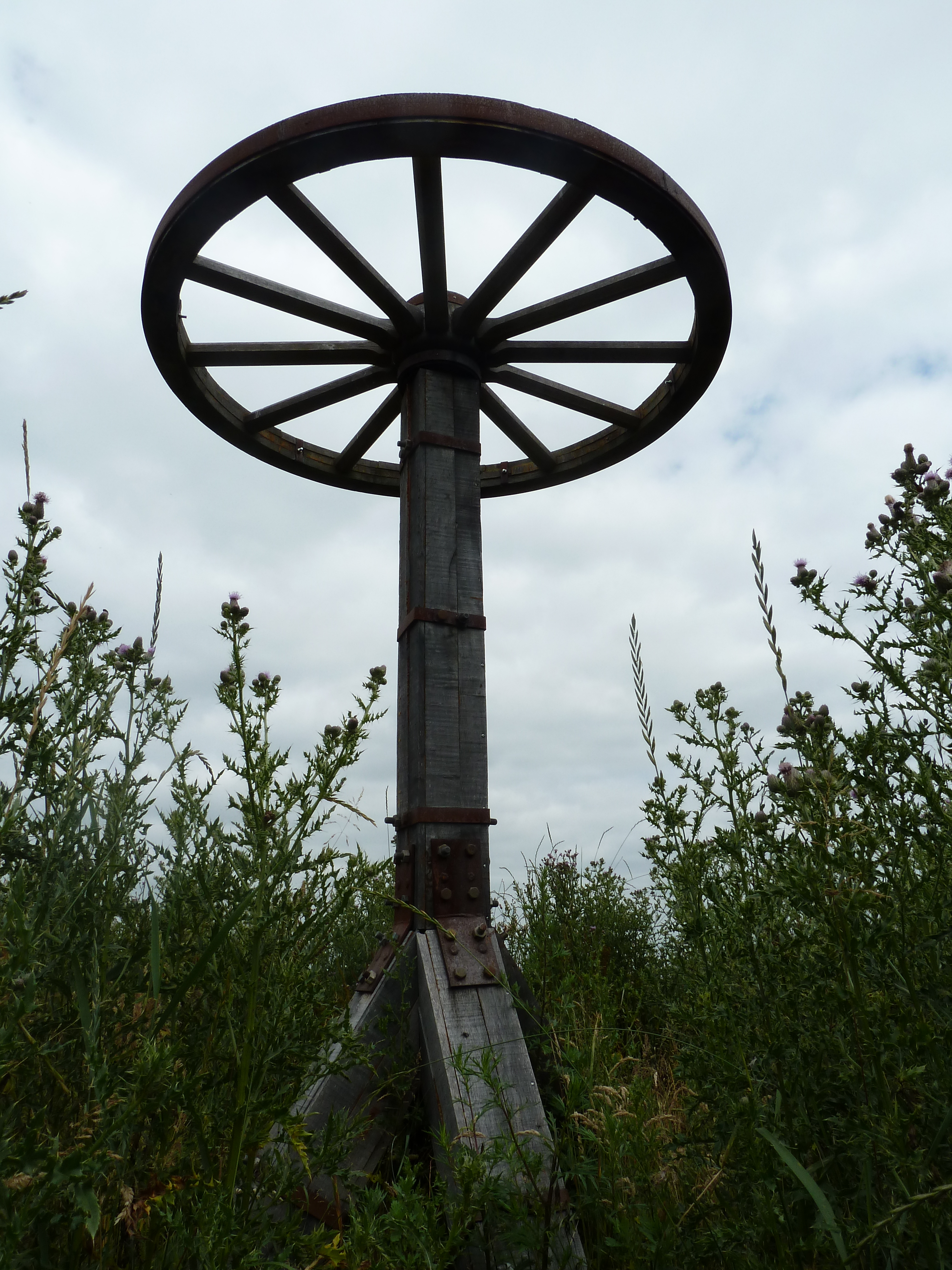 Grietjens Gericht, Beesel, Limburg, Nederland